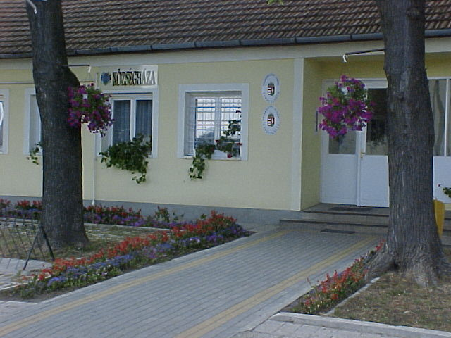 Ramocsaházai polgármesteri hivatal